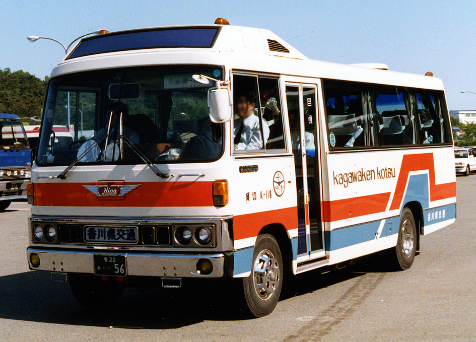 香川県交通 日野・レインボー K-AM101